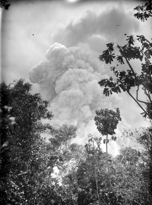 Negatief. Gezicht vanuit het bos op de eruptie van de vulkaan Tangkubanprahu